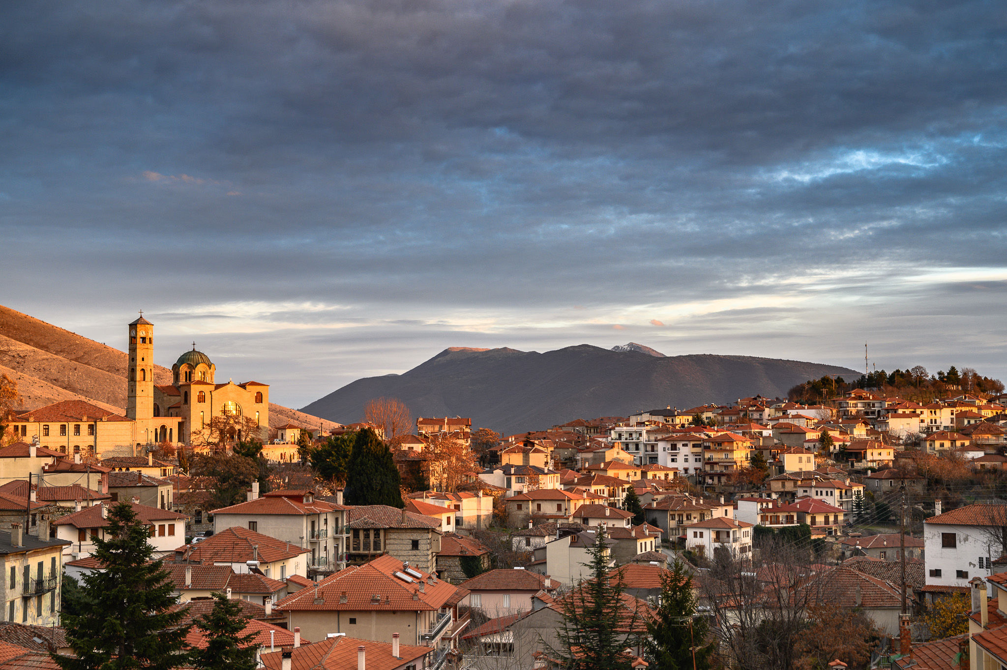 Άποψη της Σιάτιστας όπου κυριαρχεί ο Ι.Ν. του Αγίου Δημητρίου